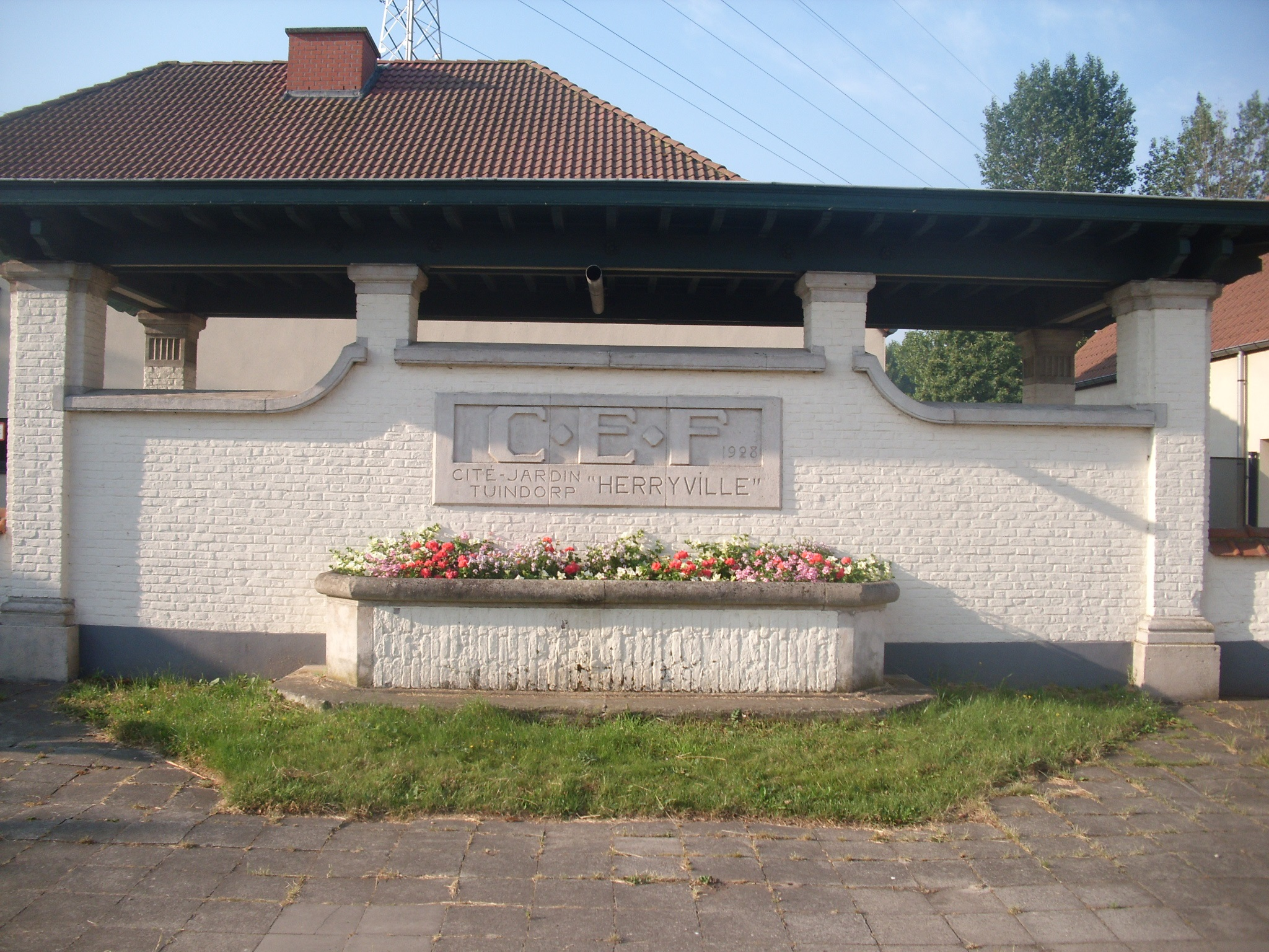 Herryville - Langerbrugge - Evergem - Oost-Vlaanderen - België